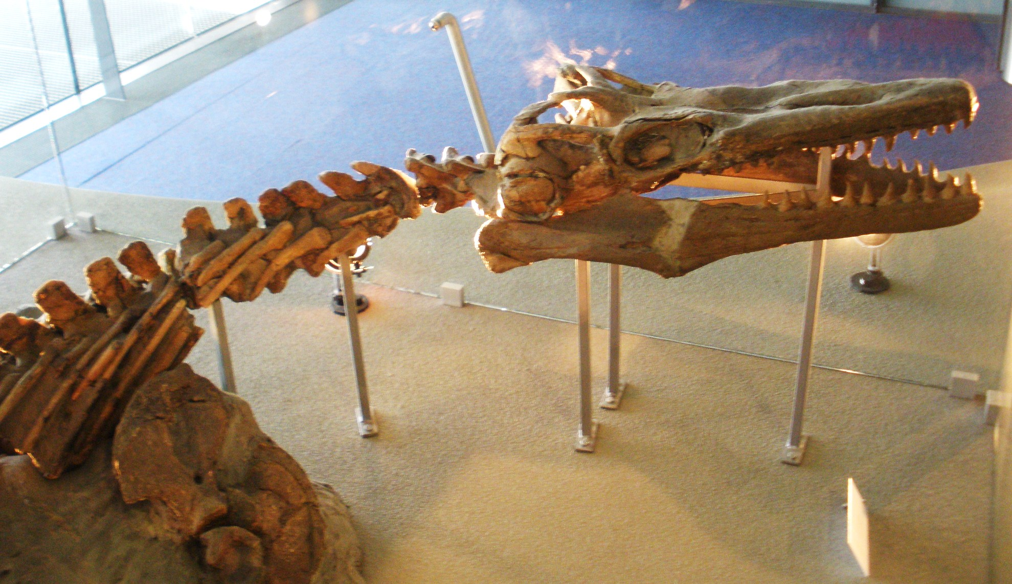 Fossil of Platecarpus, an extinct mosasaur - Took the photo at Naturalis museum, Leiden